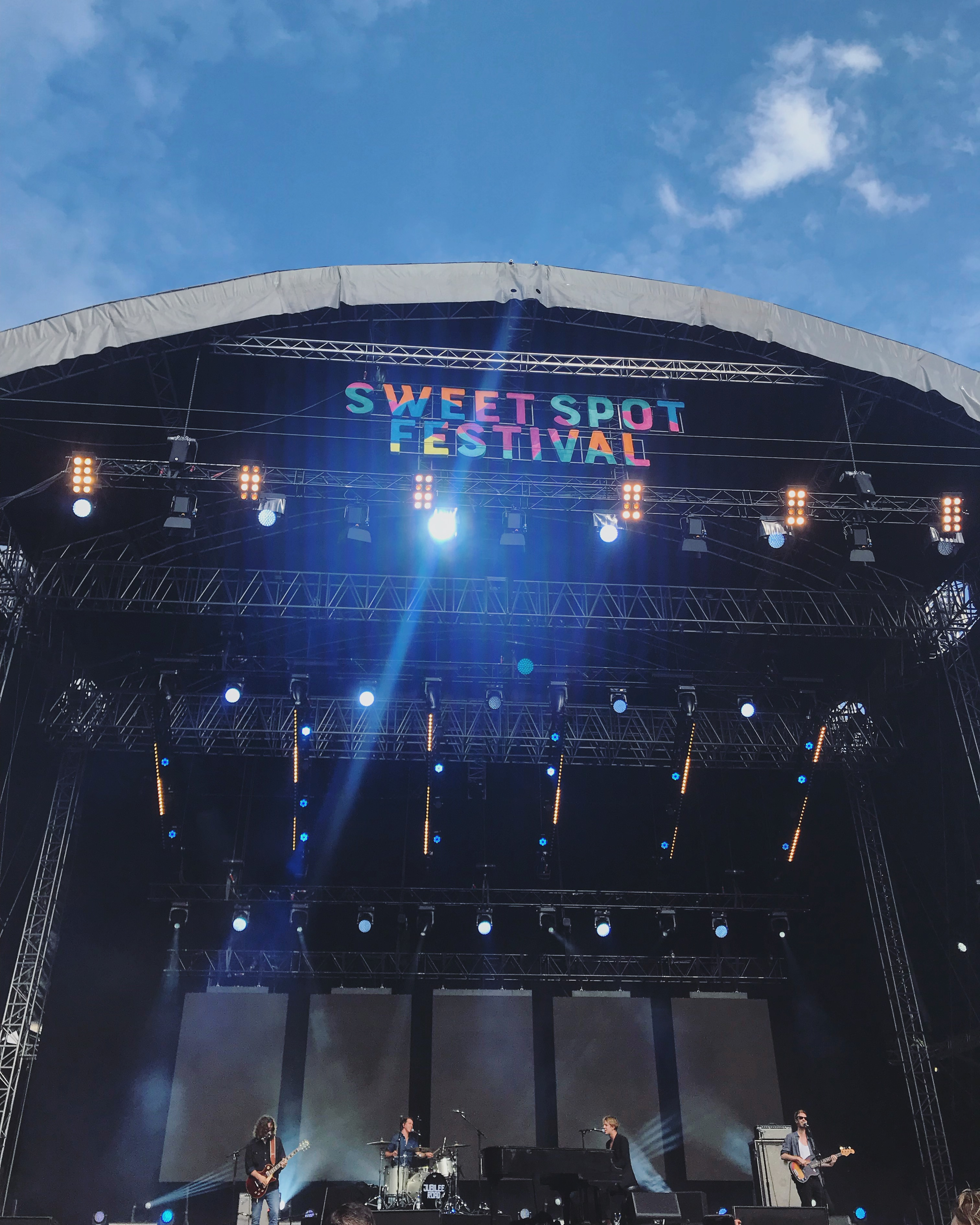 Tom Odell, Sweet Spot Festival 2018